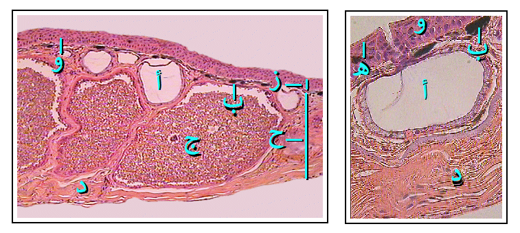 مقطع لِجلد ضفدع. أ: الغُدَّة المُخاطيَّة، ب: حاملة الصباغ، ج: الغُدَّة السامة الحُبيبية، د: النسيج الضام، هـ: الطبقة القرنيَّة، و: منطقة انتقاليَّة، ز: البشرة، ح: الأدمة.